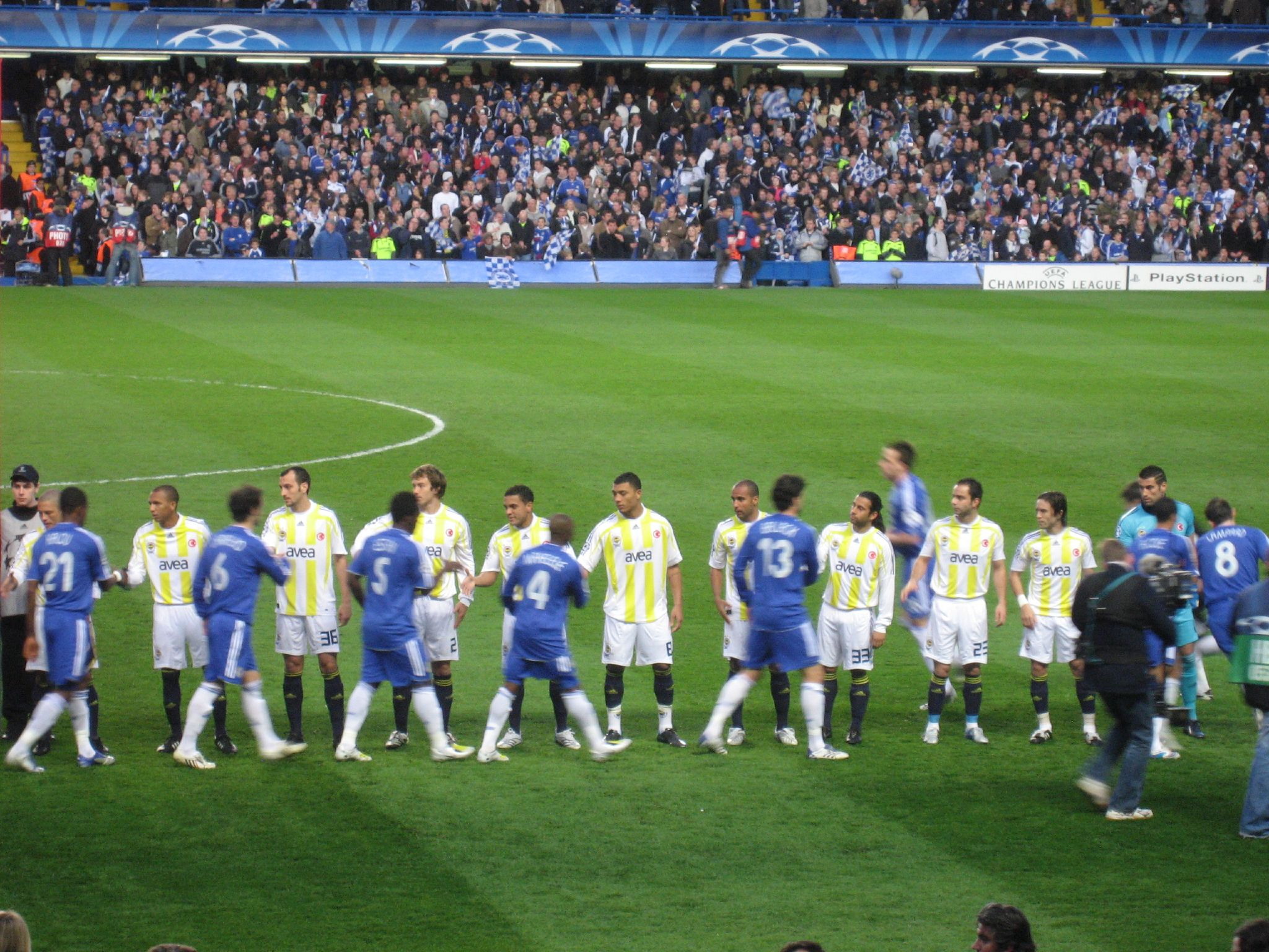 Chelsea 2-0 Fenerbahçe